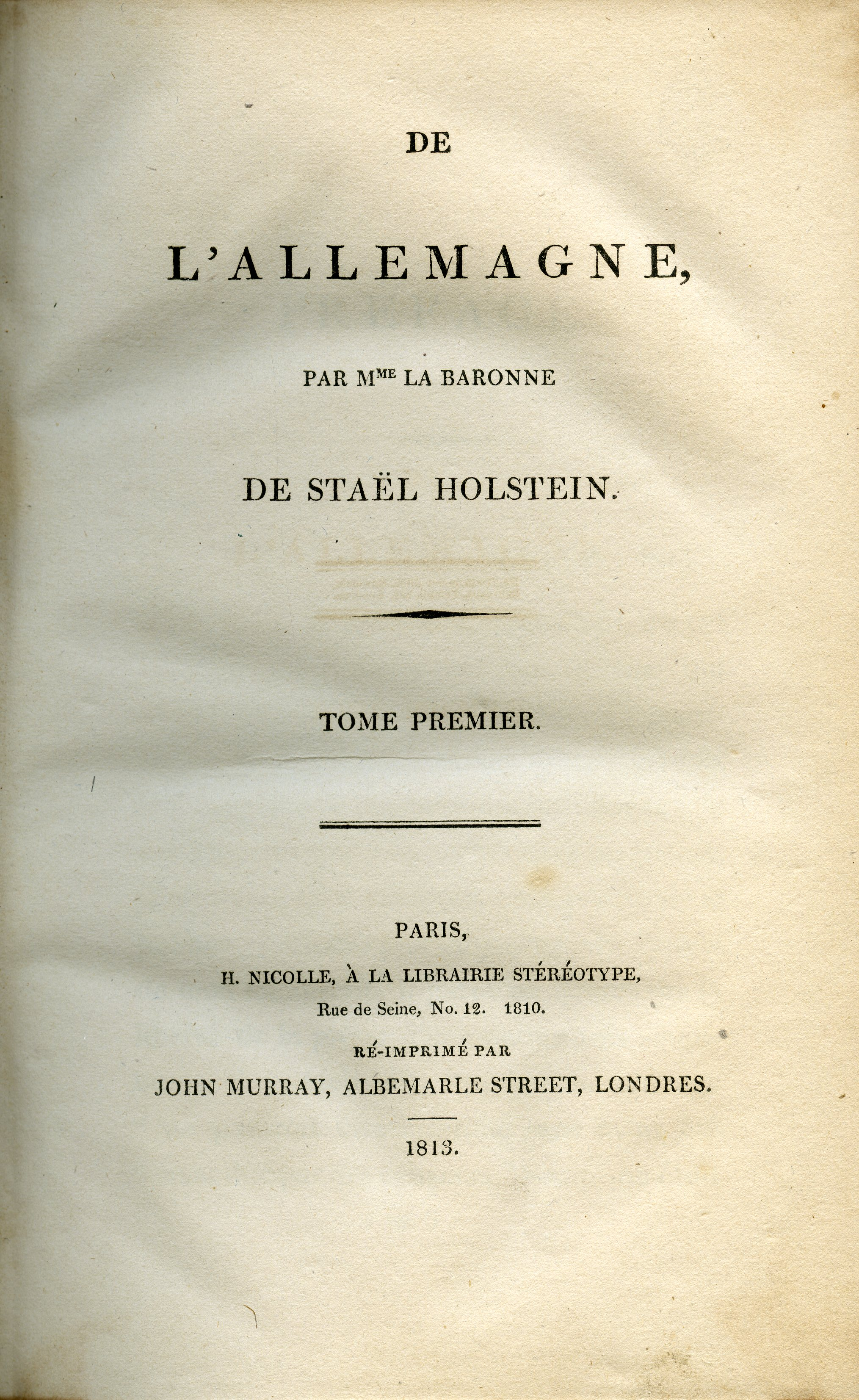 2e édition